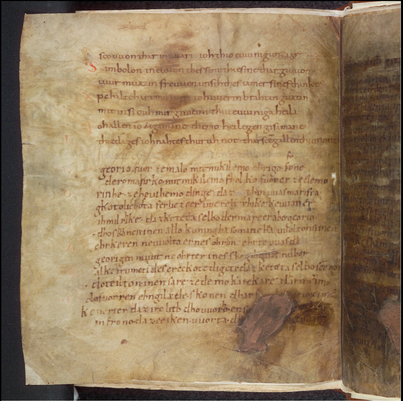 Fragmentarische Abschrift des Georgsliedes. Entstanden ist der Text Ende des 9. Jahrhunderts vermutlich im Kloster Prüm oder auf der Insel Reichenau (Bodensee).